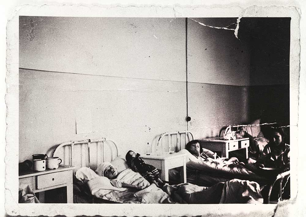 Kinder, die im Januar 1944 gerettet wurden und ins Krankenhaus nach Siedlce gebracht worden waren.